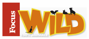 Logo del periodico Focus Wild edito da Arnoldo Modadori Editore.